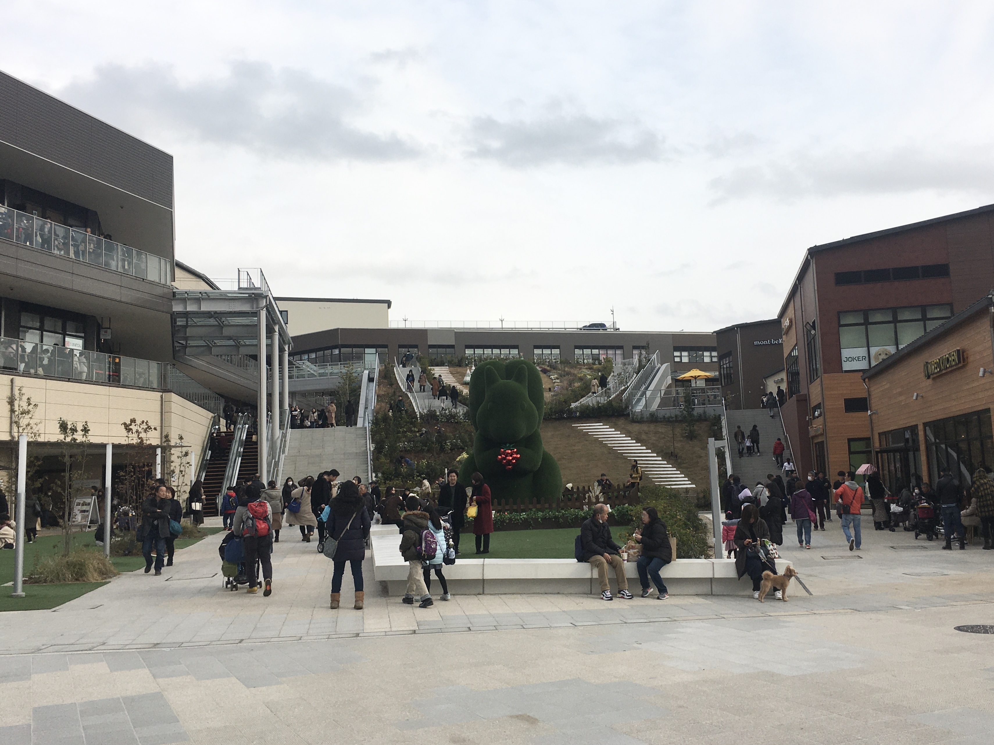 グランベリーパークのセントラルコートエリア西側入口部にあたるパークプラザ。さらに西側に広がる鶴間公園と接続している広場。